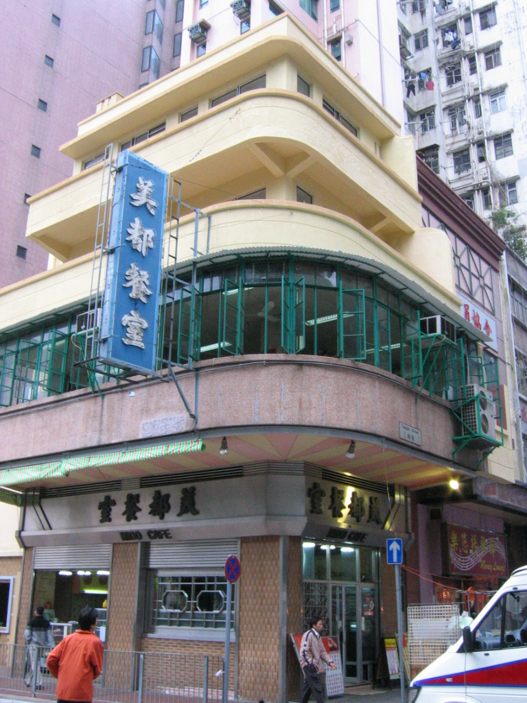 香港九龍油麻地美都茶餐廳